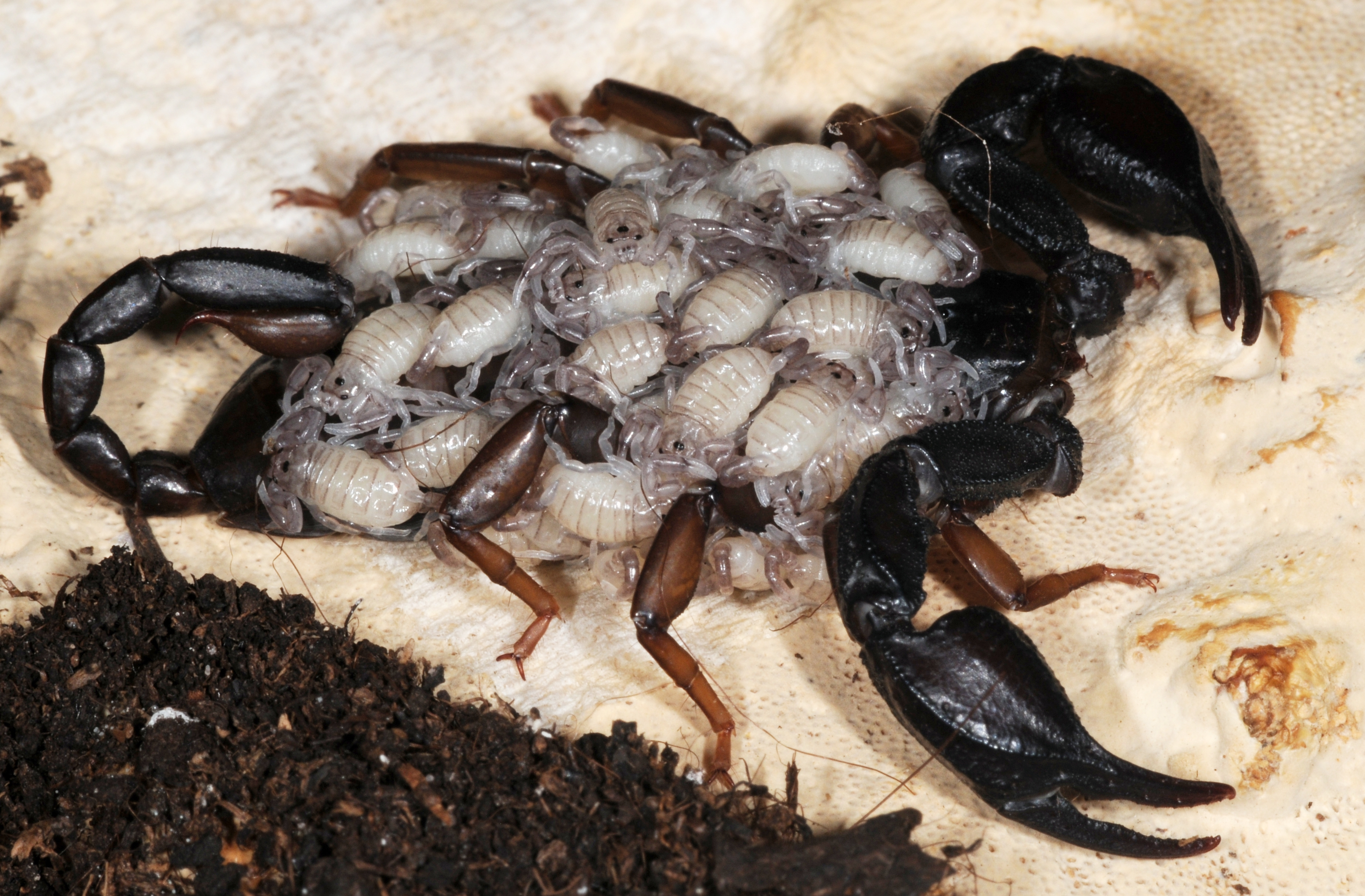 Euscorpius italicus, Weibchen mit Jungtieren, Gefangenschaft, ursprünglich aus dem Wallis, Schweiz